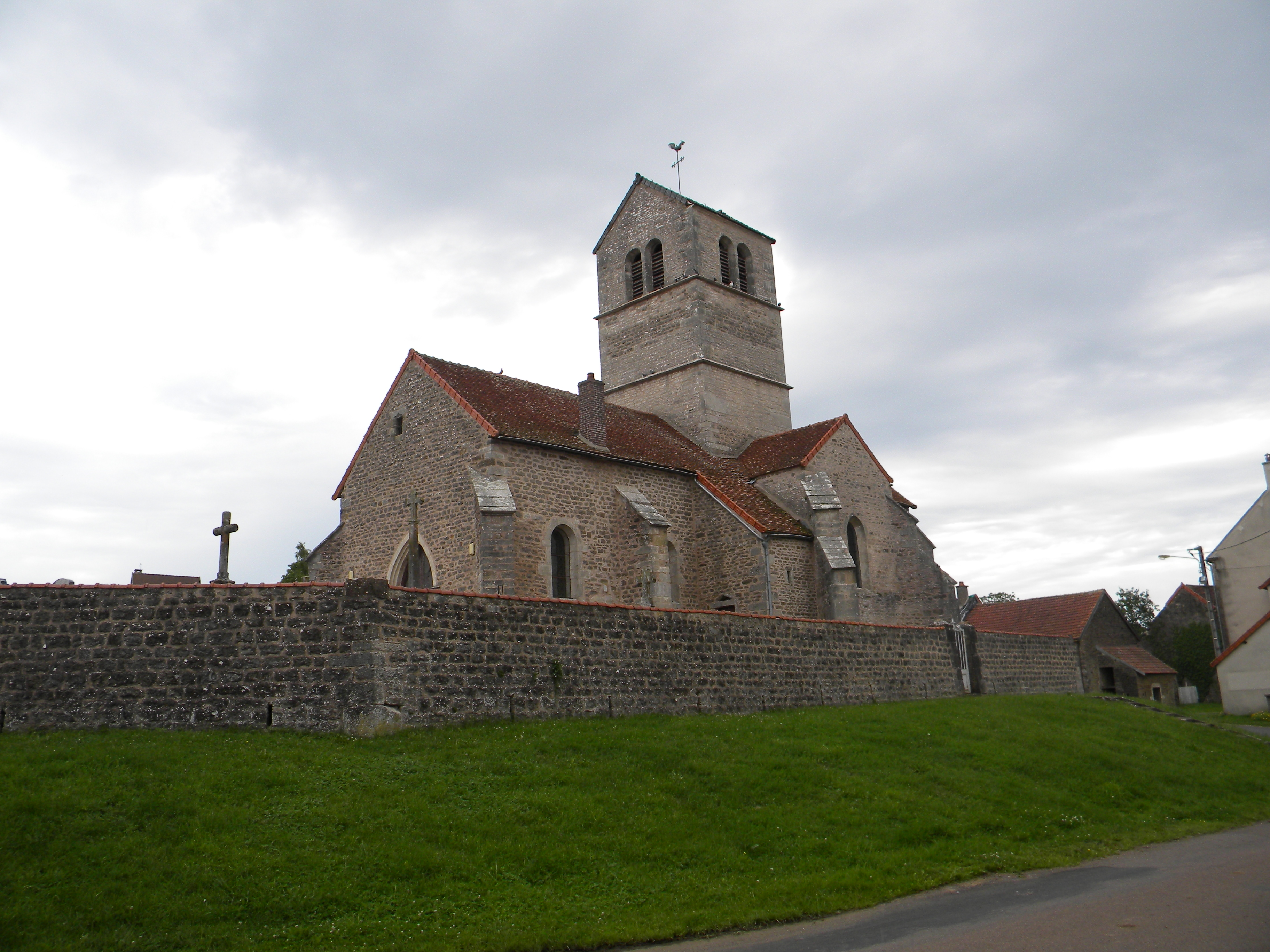 Preĝejo.JPG de Saussey (Francio)